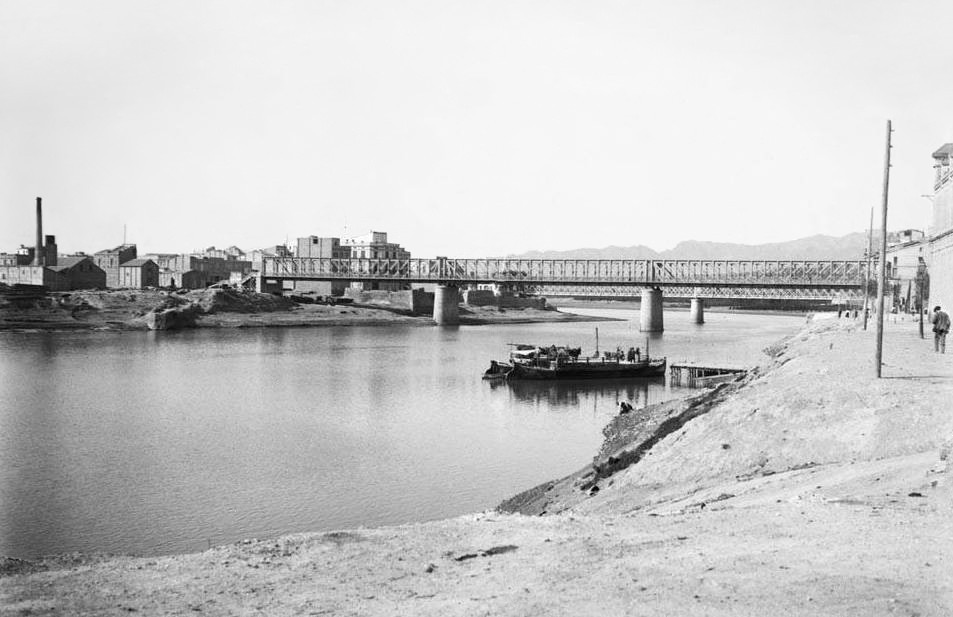 Imatge